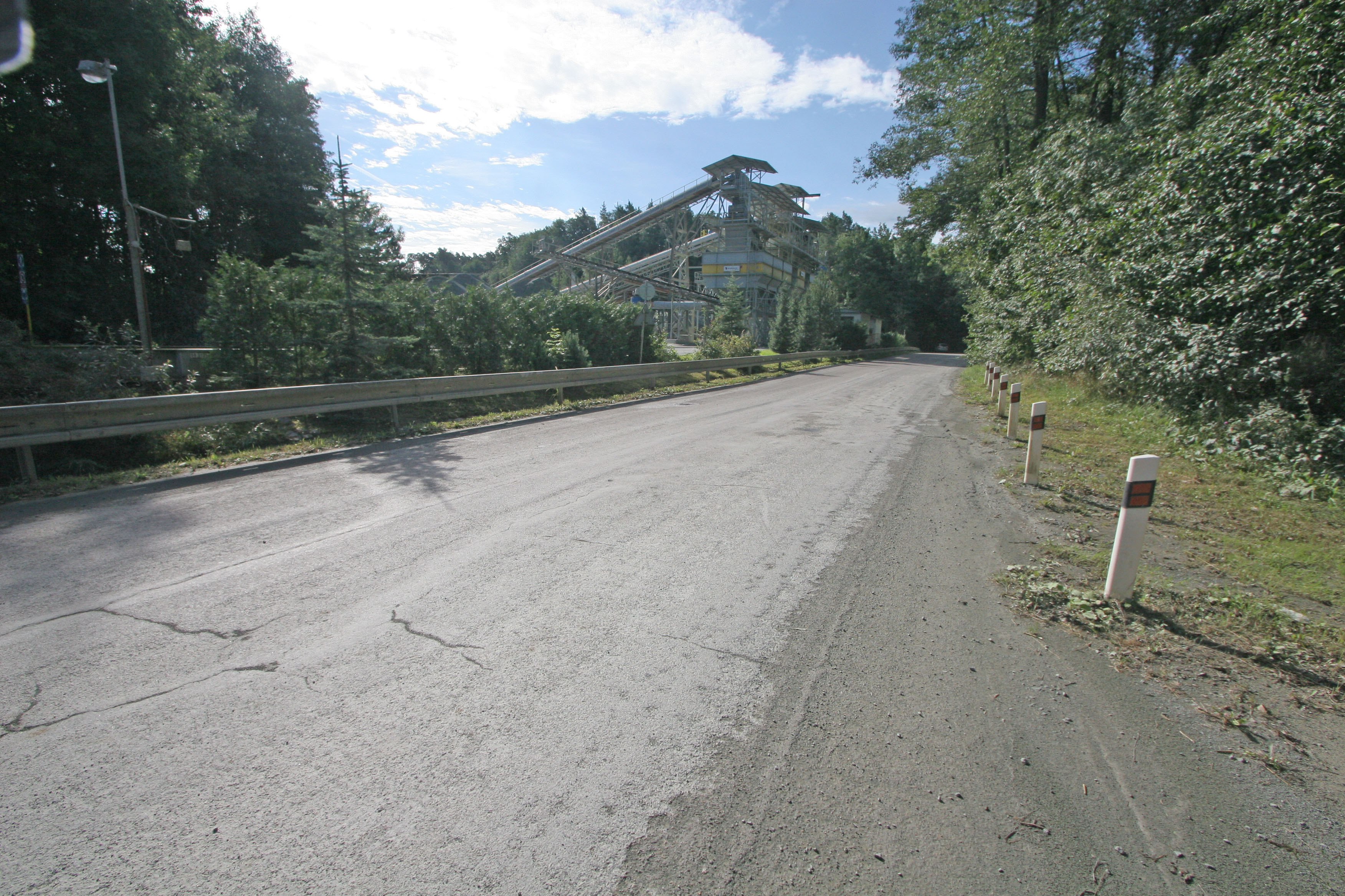 Chrtníky lom1